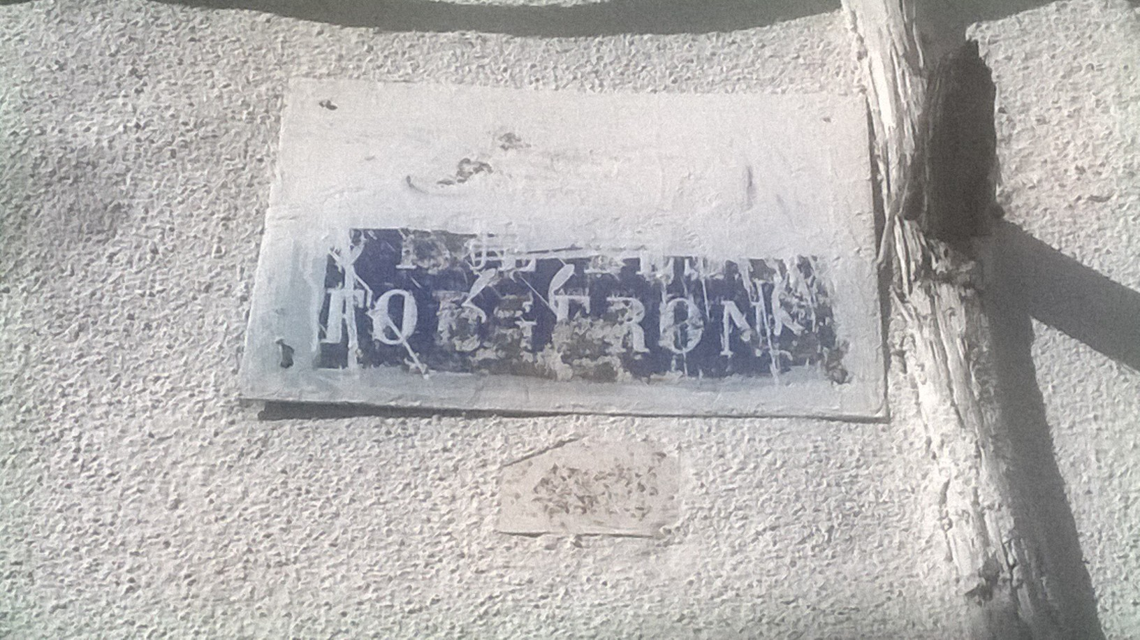 La médina de Tunis مدينة تونس العتيقة